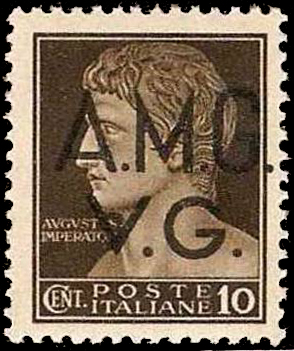 Почтовая марка Венеции-Джулии (Италия) под англо-американской оккупацией, надпечатка на марке Италии 1929 года. Stamp for the Anglo-American occupation of Venezia-Giulia